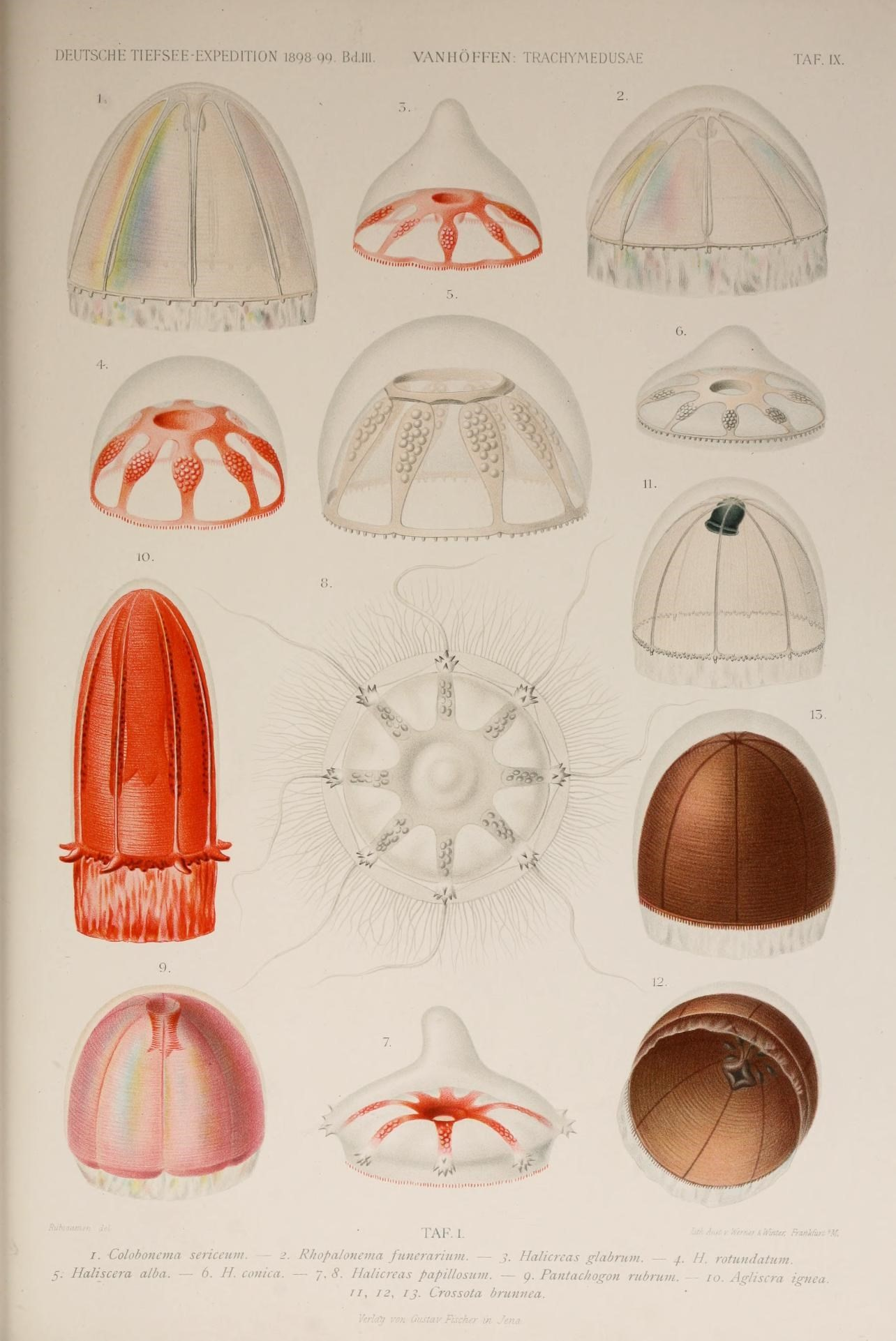 1. Colobonema sericeum, 2. Rhopalonema funerarium, 3. Halicreas glabrum, 4. H. rotundatum, 5. Haliscera alba, 6. H. conica, 7.-8. Halicreas papillosum (=H. minimum), 9. Pantachogon rubrum (=P. haeckeli), 10. Agliscra ignea (Colobonema igneum), 11.-13. Crossota brunnea